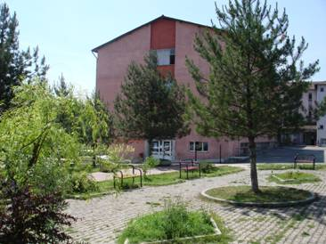 TED Karabük College, Karabük, Turkey